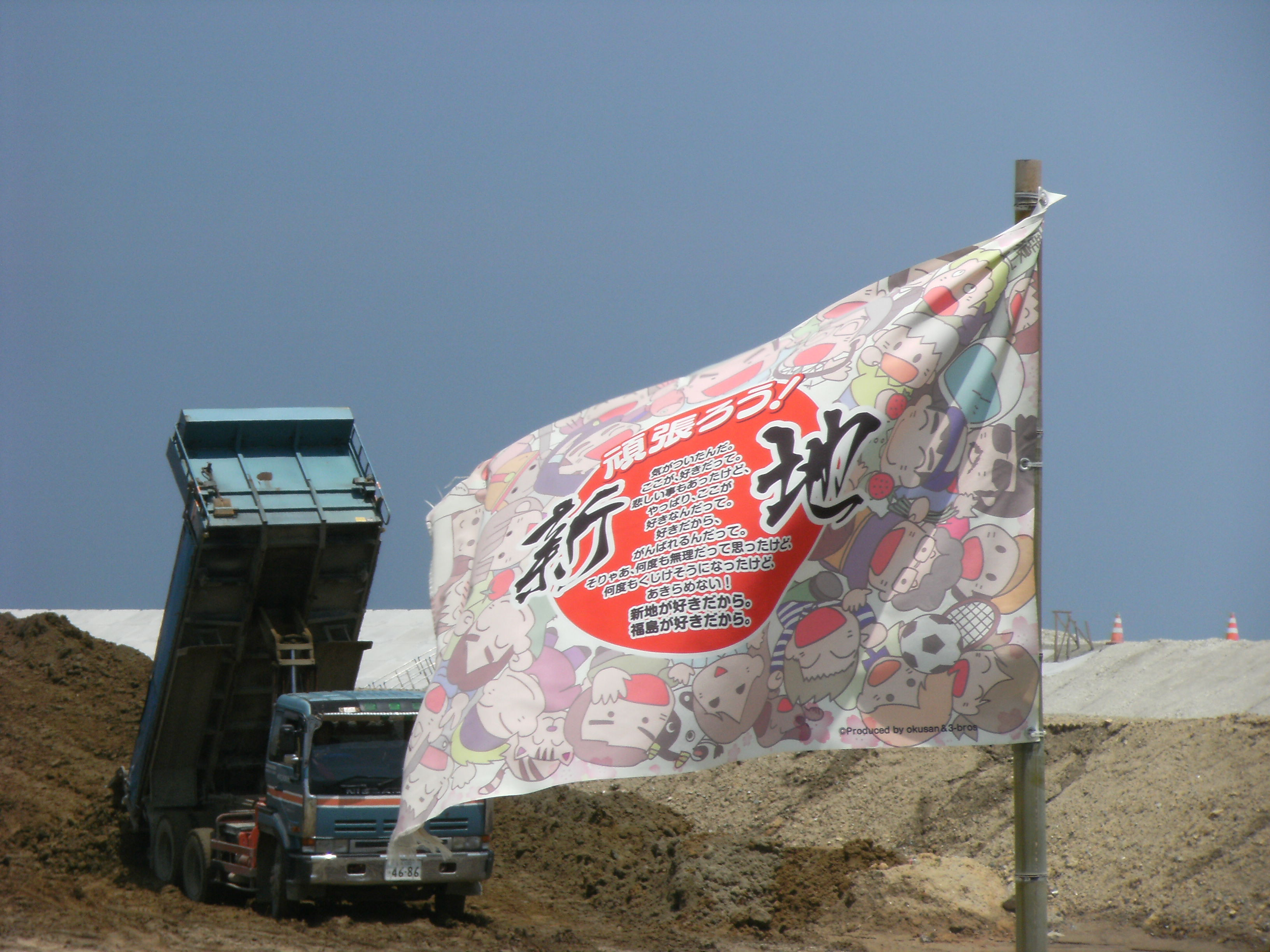 １．５倍の大きさになった、復興フラッグ